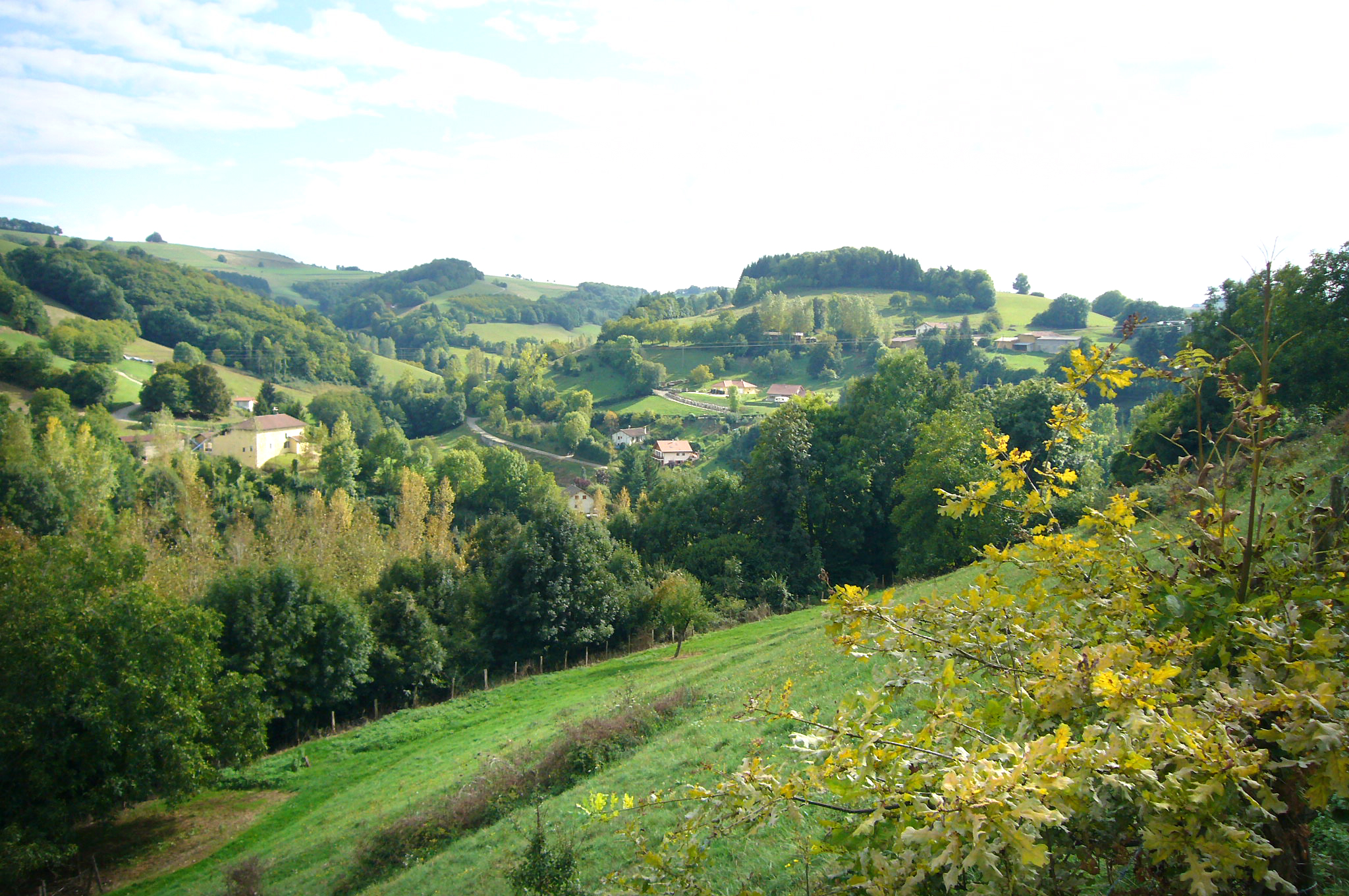 St Michel de St Geoirs, le village